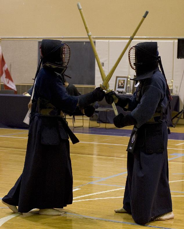 Поединок в кэндо Photo by User:Ajma (En:Wiki).